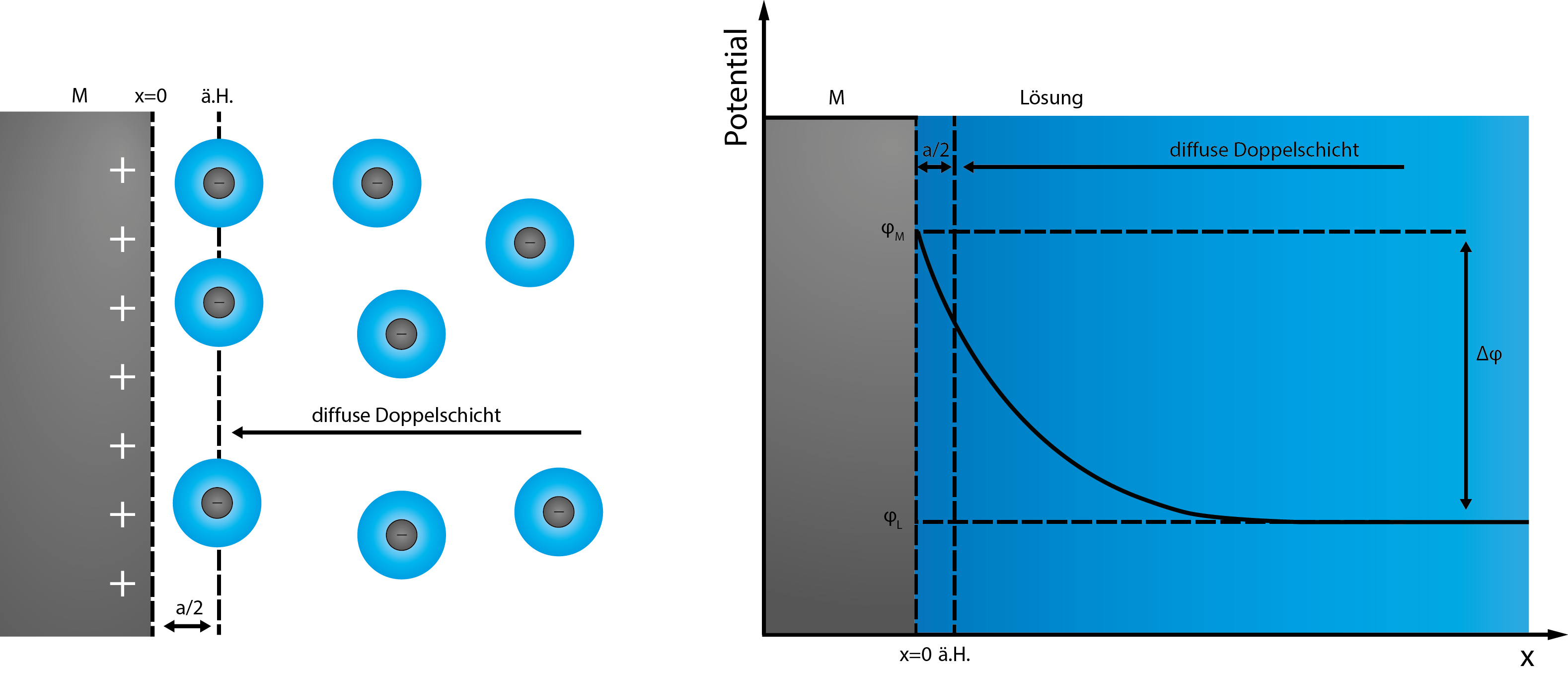 Das Gouy-Chapman Modell der elektrochemischen Doppelschicht. M = Elektrodenmetall, ä.H. = äußere Helmholtz-Fläche, a/2= Radius der solvatisierten Überschuss Ionen, Delta rho = Galvanispannung.